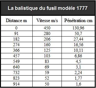 fusil Charleville 1777 - tableau de balistique.